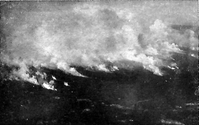 Deutsches Trommelfeuer beim Angriff des Unternehmens "Blücher" am Chemin des Dames